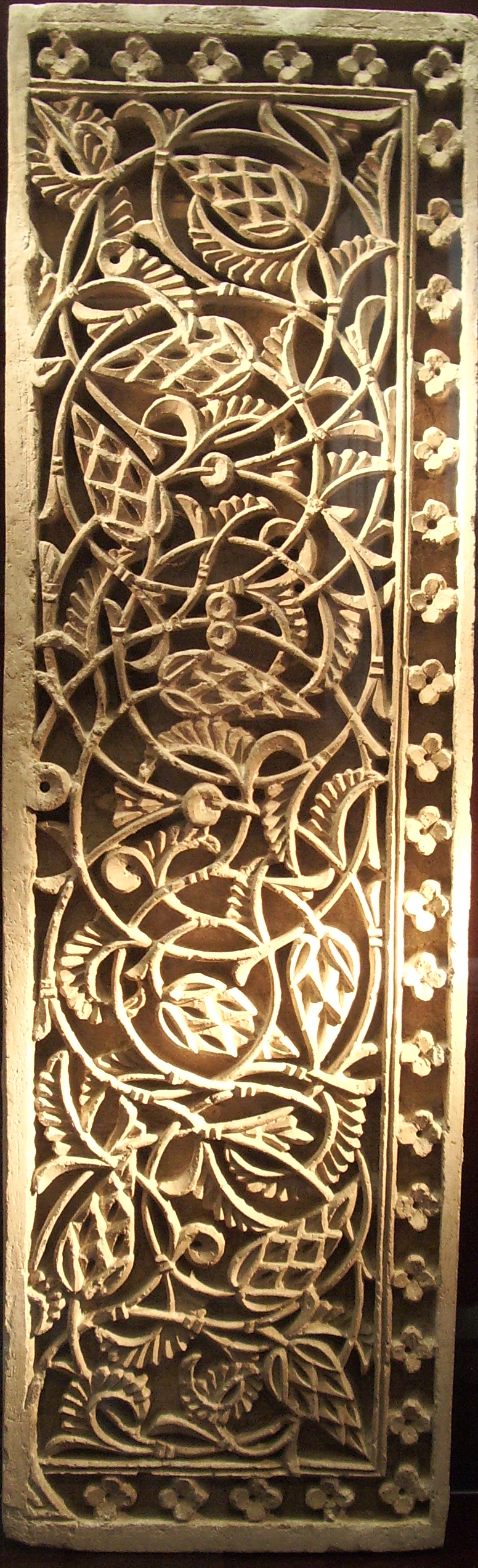 Panel decorativo vertical de la Aljafería